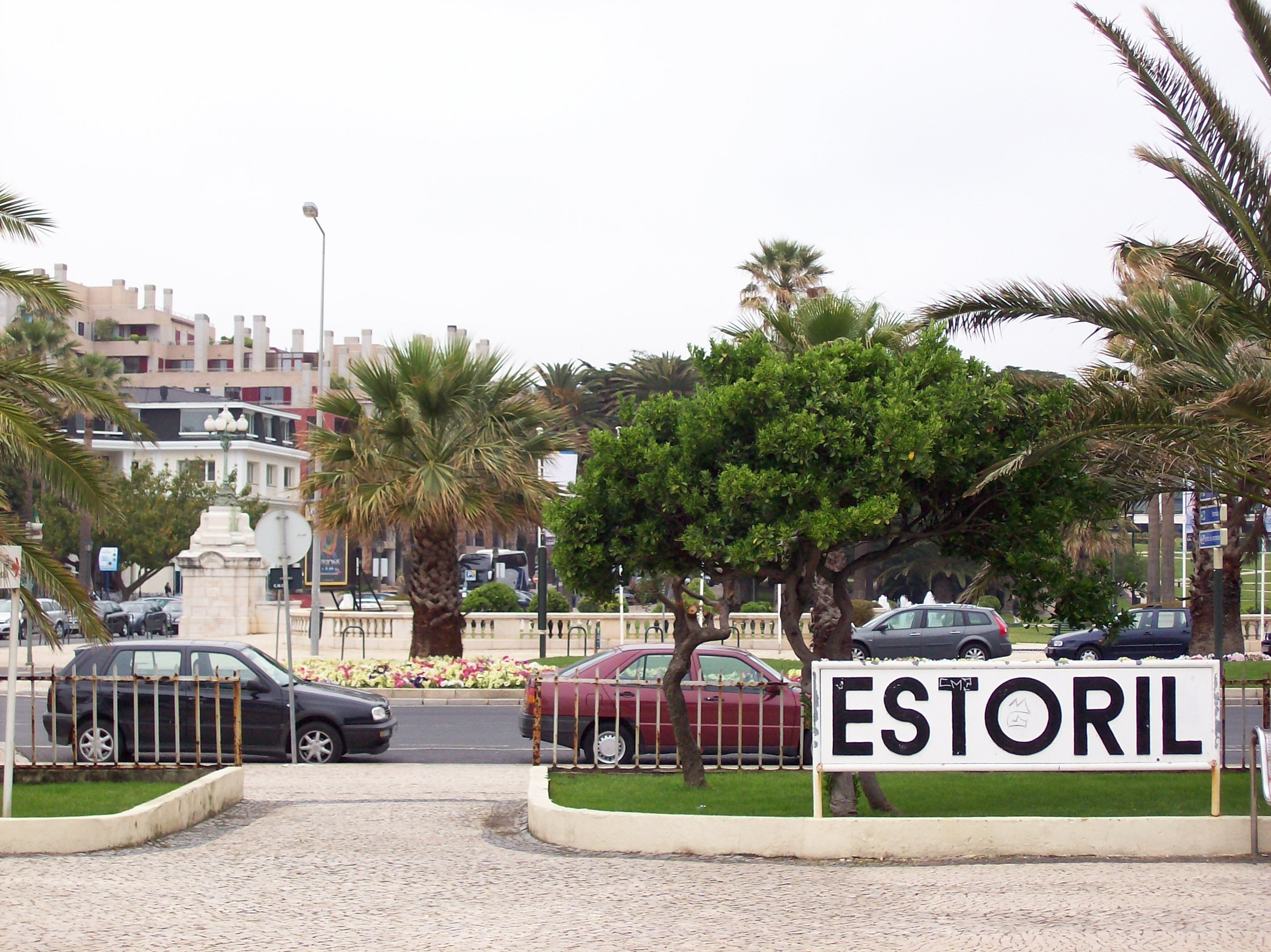 Estoril (Portugal)